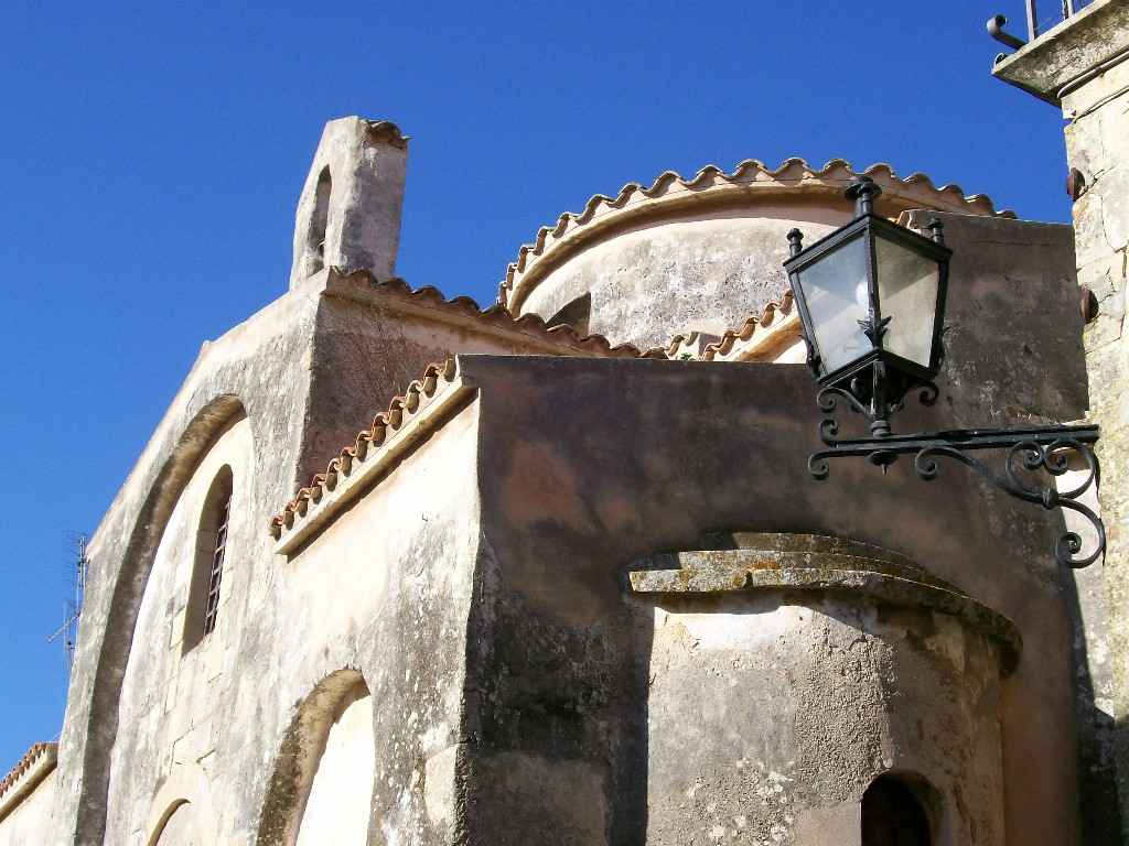 Otranto (LE), chiesa di San Pietro